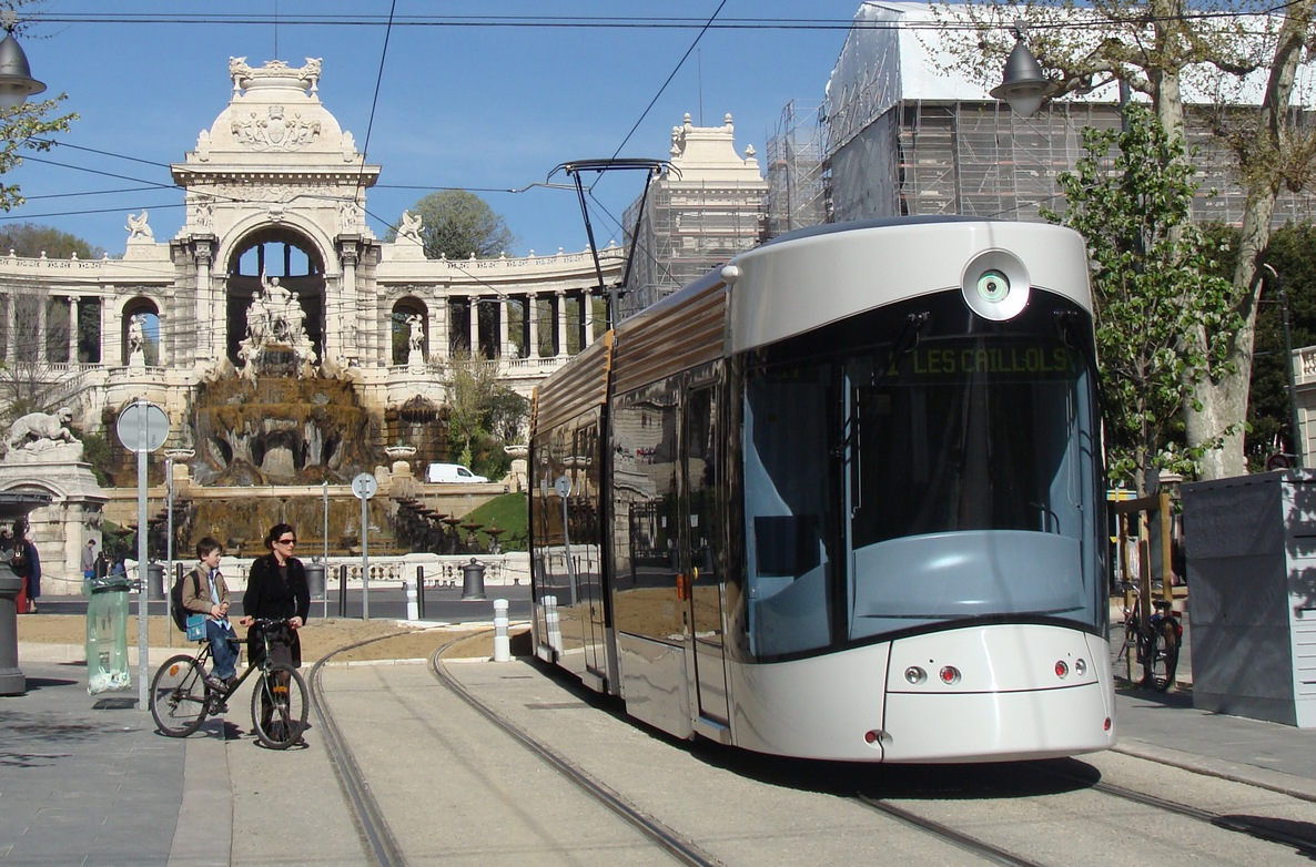 Une rame Euromed - Les Caillols à la station Longchamp